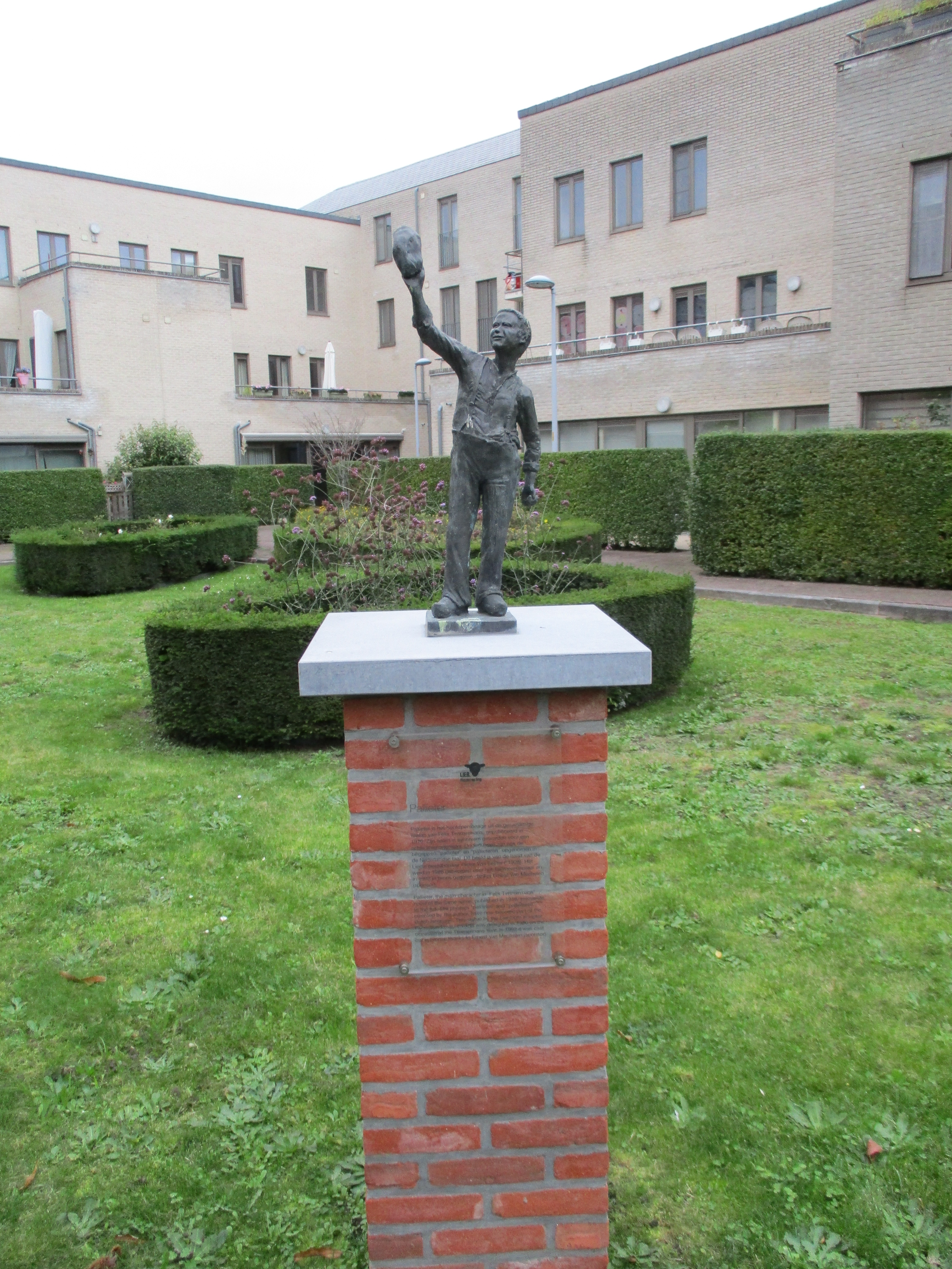 Pallieter, een beeld van Pierre van Eester, te vinden in de binnenstad van Lier